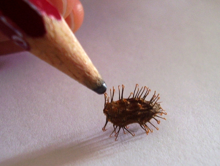 Bur (un fruto múltiple de aquenios, rodeado de una carcaza con espinas) de Xanthium spinosum donde se puede apreciar los pequeños ganchos de las espinas.